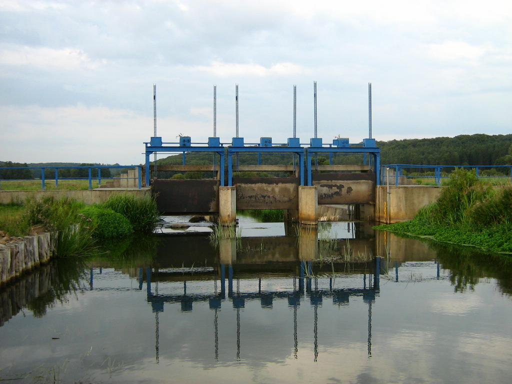 Das Zarnewanzer Wehr der Recknitz zwischen Tessin und Bad Sülze im Naturschutzgebiet „Recknitzwiesen“.54°2′53.01″N 12°31′31.19″E / 54.0480583°N 12.5253306°E